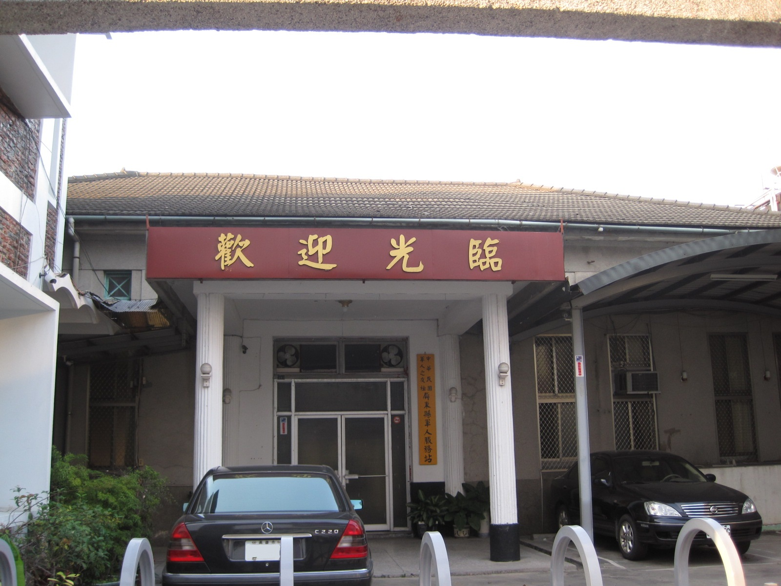 中華民國軍人之友社屏東縣軍人服務站，位於臺灣屏東縣屏東市公園路28號。